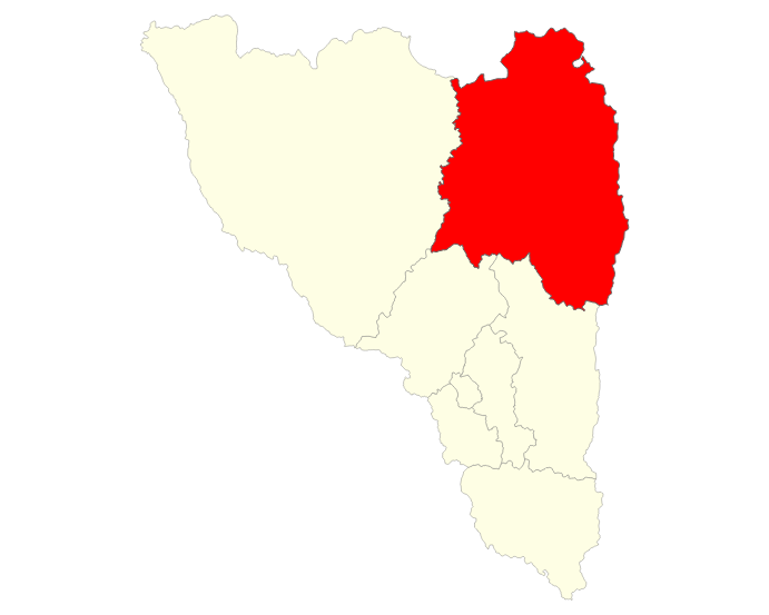 Localisation du district d'Anjozorobe dans la région Analamanga